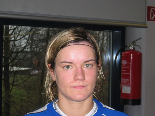 Jennifer Zietz